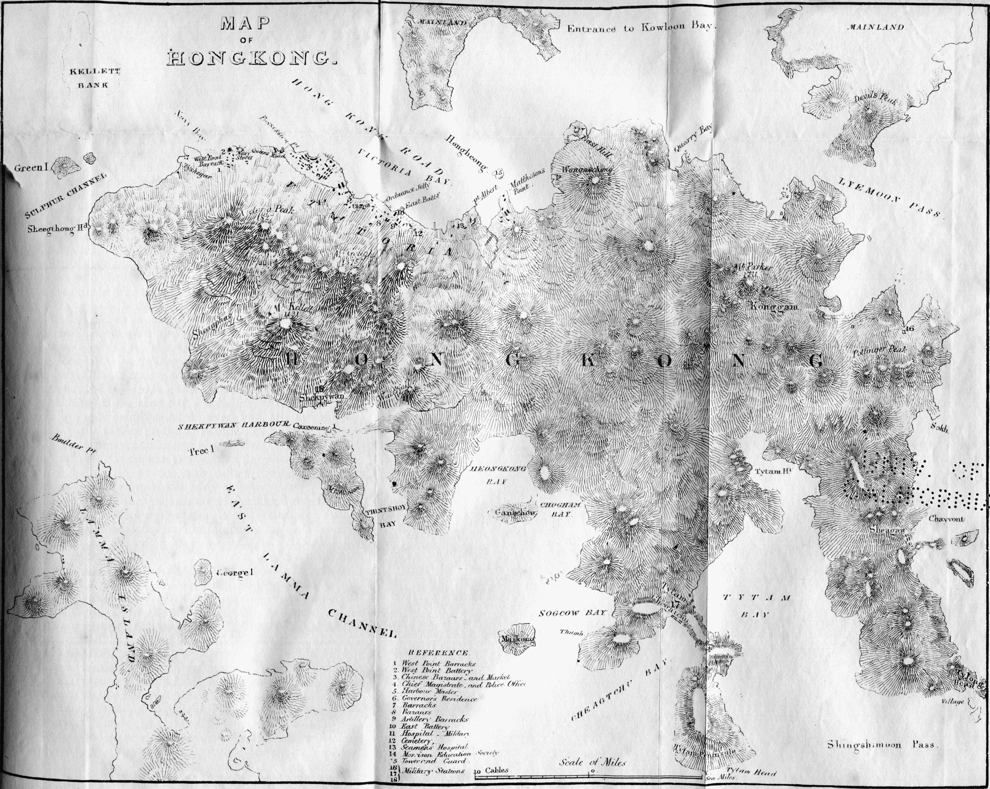 Map of Hong Kong.